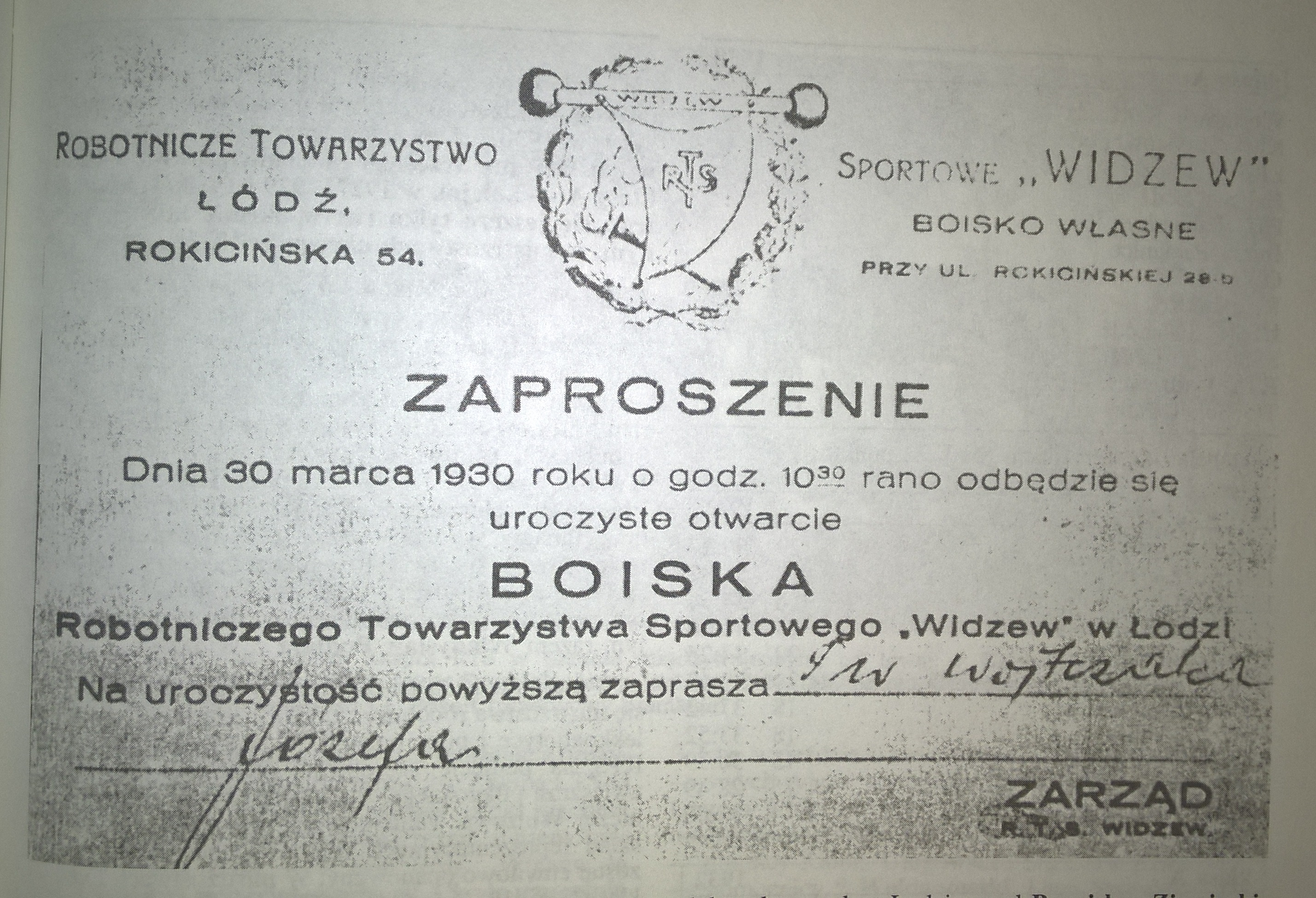 Zaproszenie z dnia 30 marca 1930 roku na uroczyste otwarcie boiska RTS Widzew w Łodzi.